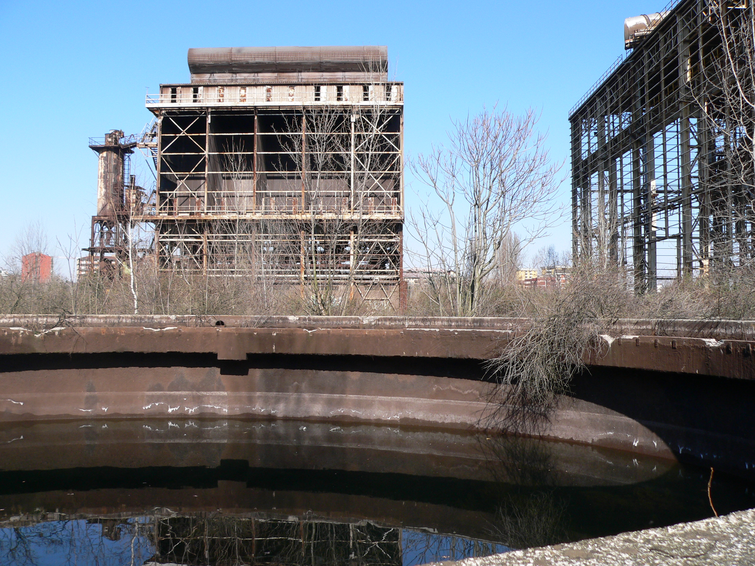 Comparto Unione area ex-Falck Depuratore fumi Il depuratore fumi dell'Unione è un edificio ex industriale che sopravvive nell'are ex Falck Unione. Era l'impianto per l’abbattimento e la depurazione fumi collegato con due grossi tubi al forno di fusione T3. L’aspirazione dei fumi durante il suo funzionamento, la carica del forno e la colata permetteva di limitare le emissioni di polveri in atmosfera. L'edificio sorge oggi in un'area dismesse e rientra tra gli edifici del progetto di candidatura di Sesto per l'UNESCO per la categoria del paesaggio culturale evolutivo. This is a photo of a monument which is part of cultural heritage of Italy.